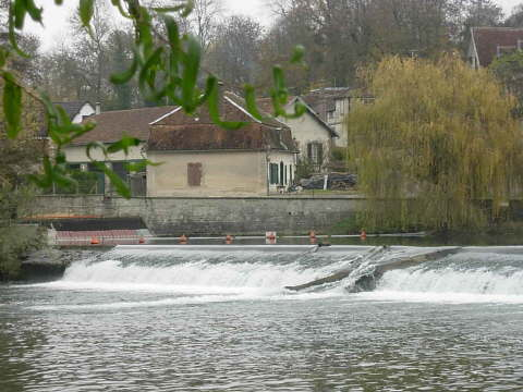 Chappes